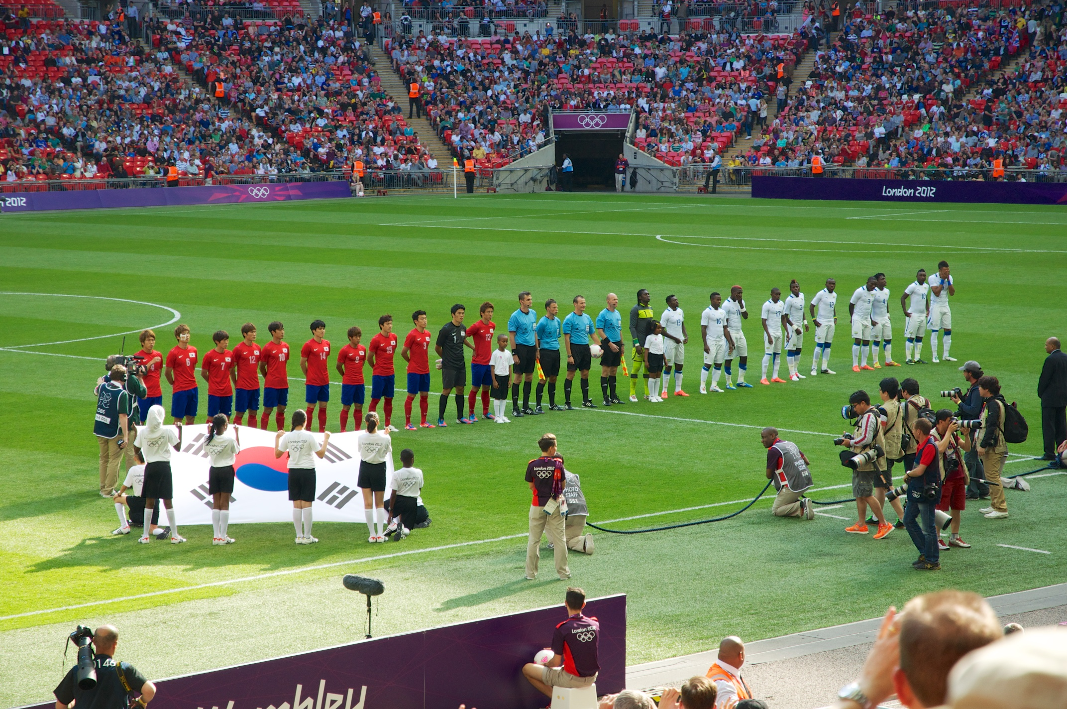 Olympique football, Korée versus Gabon.